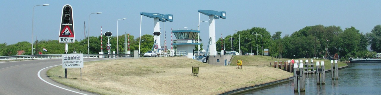 Een sluisbrug in Den Helder. A bridge and lock in the city Den Helder.